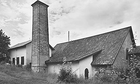 Trångfors smedja, början till nuvarande "Bruket".